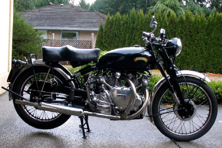 Vincent Rapide Series C